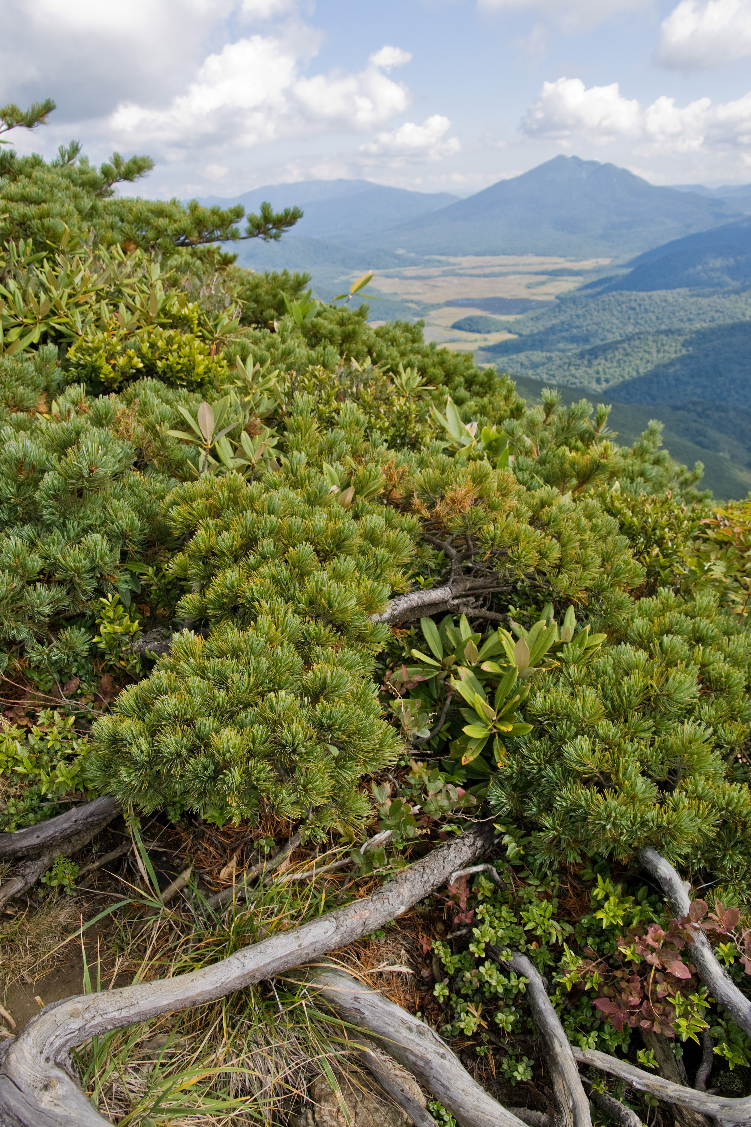 ハイマツ (学名:Pinus pumila)